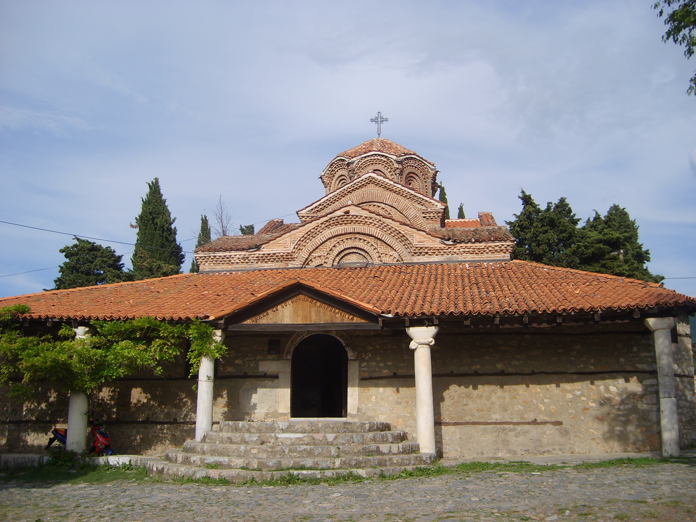 Охрид This image is uploaded as part of the picture contest Wiki Loves Cultural Heritage in Macedonia 2013. English | македонски | +/−